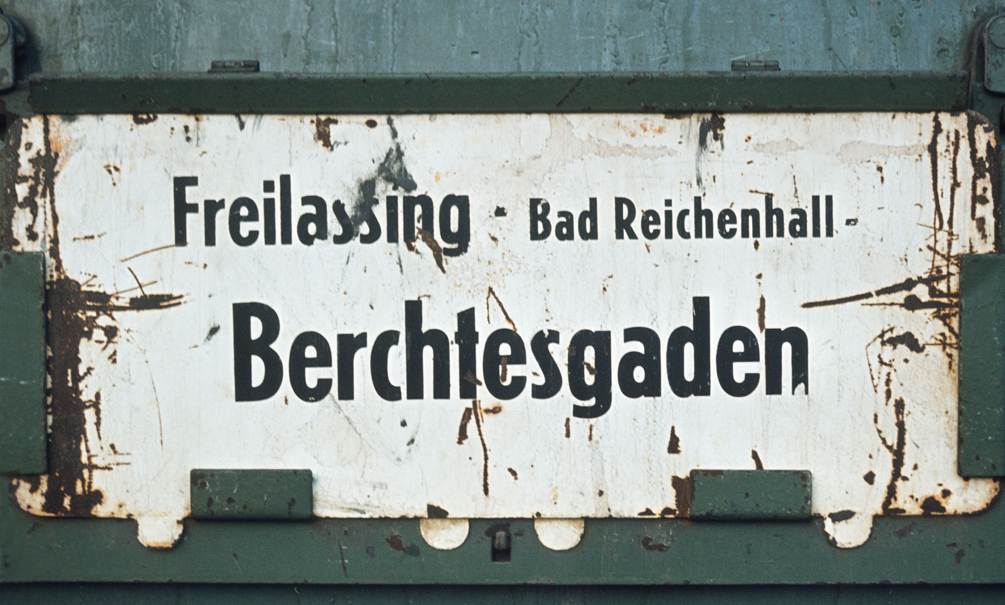 Zuglaufschild eines Nahverkehrszuges der Strecke Freilassing an einem Altbau-Reisezugwagen, 1980